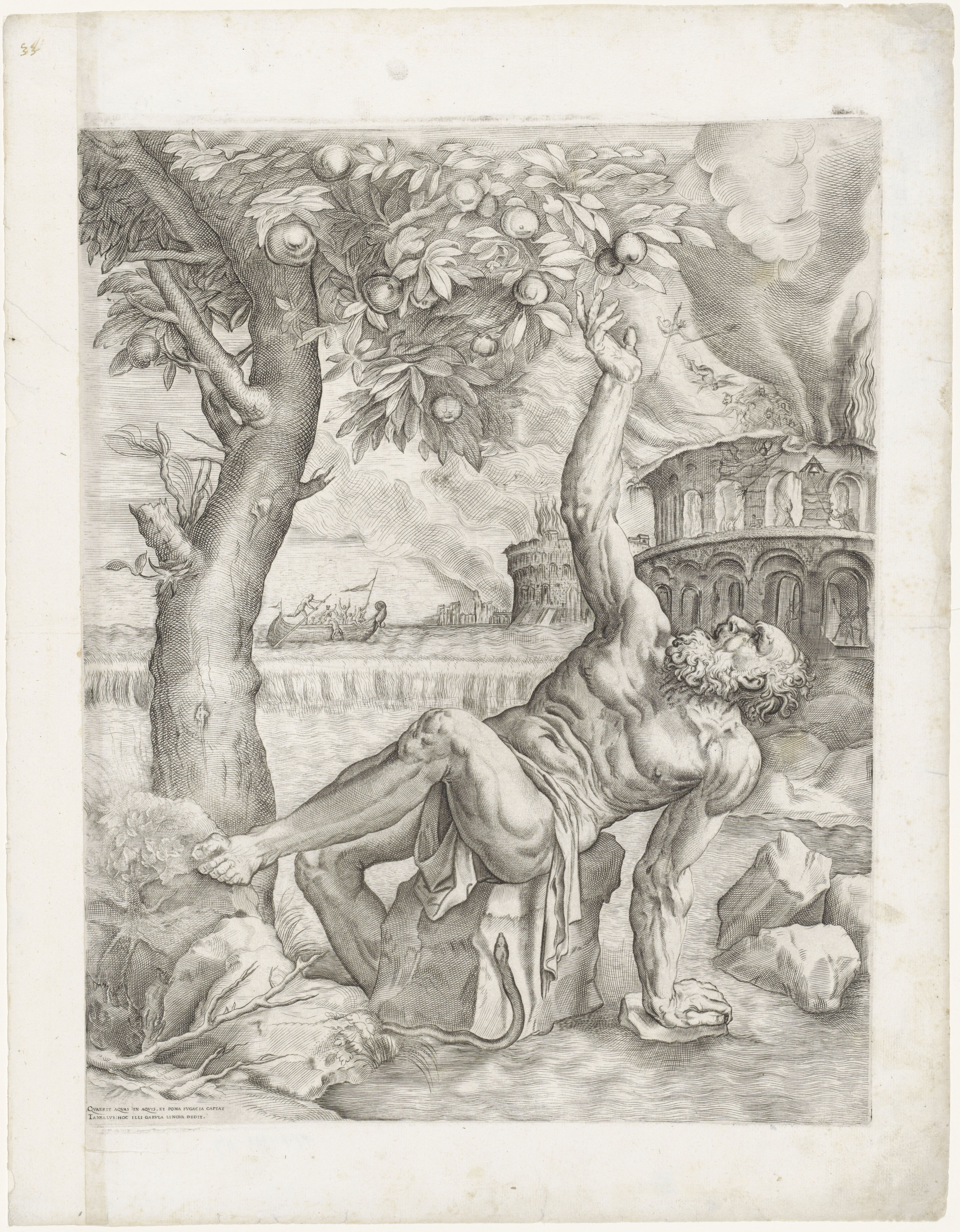 IdentificatieTitel(s): TantalusObjecttype: prent albumblad Objectnummer: RP-P-1999-113Opschriften / Merken: nummer, recto linksboven, handgeschreven in bruine inkt: ‘33’ verzamelaarsmerk, verso, gestempeld: Lugt 2760 verzamelaarsmerk, verso, gestempeld: Lugt 2228 watermerk: sirene in cirkel onder zespuntige ster A-B (Woodward, nr. 91-92) (prent)Omschrijving: Tantalus, zittend op een rots in het water, met één hand steunend op een tweede steen in het water, met de andere hand reikend naar de appels die boven zijn hoofd aan de appelboom hangen. Tegen de steen waarop hij zit kruipt een slang. Op de achtergrond brandende gebouwen en demonen (de hel?) en Charon die mensen in een boot naar Hades vaart. De voorste helft van de zee is gezakt. (Tantaluskwelling: hij kan de vruchten nooit plukken en het water nooit drinken). Links onder twee regels onderschrift in het Latijn.VervaardigingVervaardiger: prentmaker: Giulio Sanuto naar schilderij van: TitiaanPlaats vervaardiging: ItaliëDatering: ca. 1565Fysieke kenmerken: ets en gravure; bevestigd op inzetstrookMateriaal: papier Techniek: etsen / graveren (drukprocedé)Afmetingen: plaatrand: h 447 mm × b 352 mmpapier: h 542 mm × b 385 mmToelichtingFolio 33 uit het prentalbum van Johann Georg I. Zobel von Giebelstadt (Röttingen 1543-07-20 - Bamberg 1580-09-07), de latere bisschop van Bamberg. Het album is vermoedelijk samengesteld tussen 1568 en 1570 in Venetië. Het album werd in 1999 uit elkaar genomen door een antiquair. De in totaal 124 folio's met prenten uit het "Zobel Album" werden aangekocht door verschillende musea en privéverzamelingen. De grootste groep (68 folio's) bevindt zich in de collectie van het Rijksmuseum. Naar een verloren gegaan schilderij door Titiaan.OnderwerpWat: (story of) TantalusVerwerving en rechtenCredit line: Aankoop uit het F.G. Waller-FondsVerwerving: aankoop 1999Copyright: Publiek domein